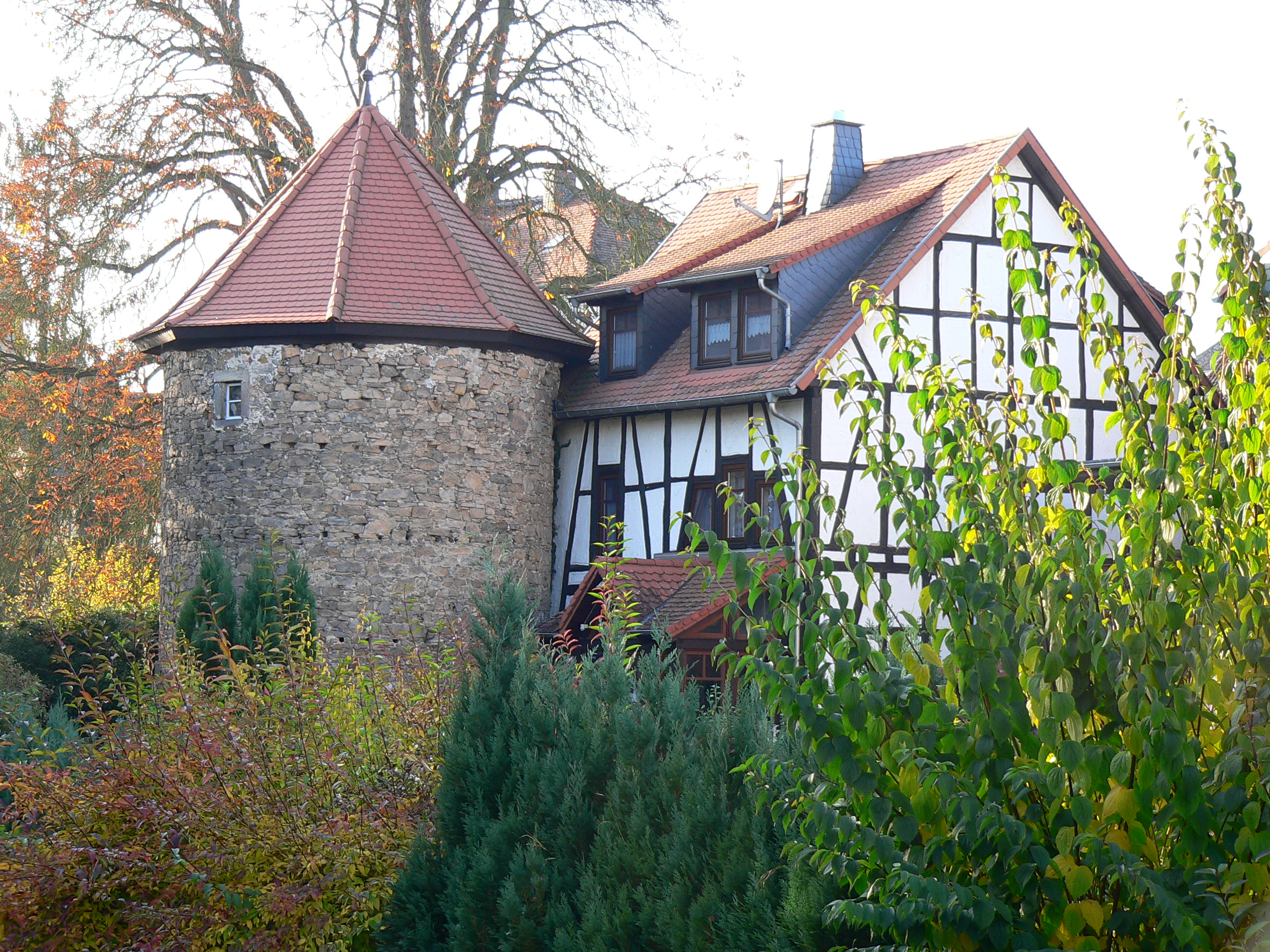 Burg Treis in Stauffenberg-Treis im Landkreis Gießen, Hessen, Deutschland